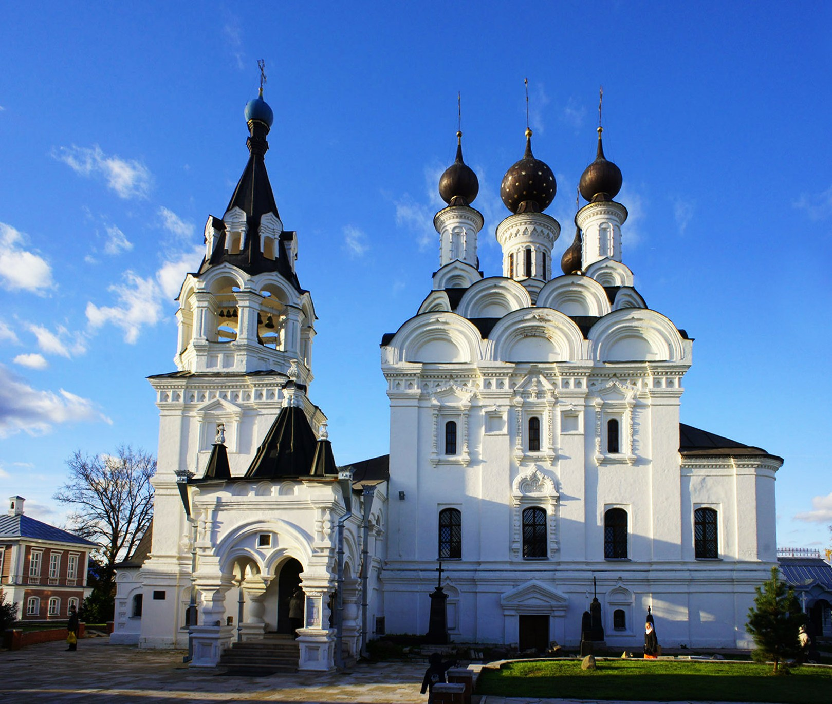 Собор Благовещенский с колокольней (Благовещенский собор) (Владимирская область, Муром, улица Красноармейская)